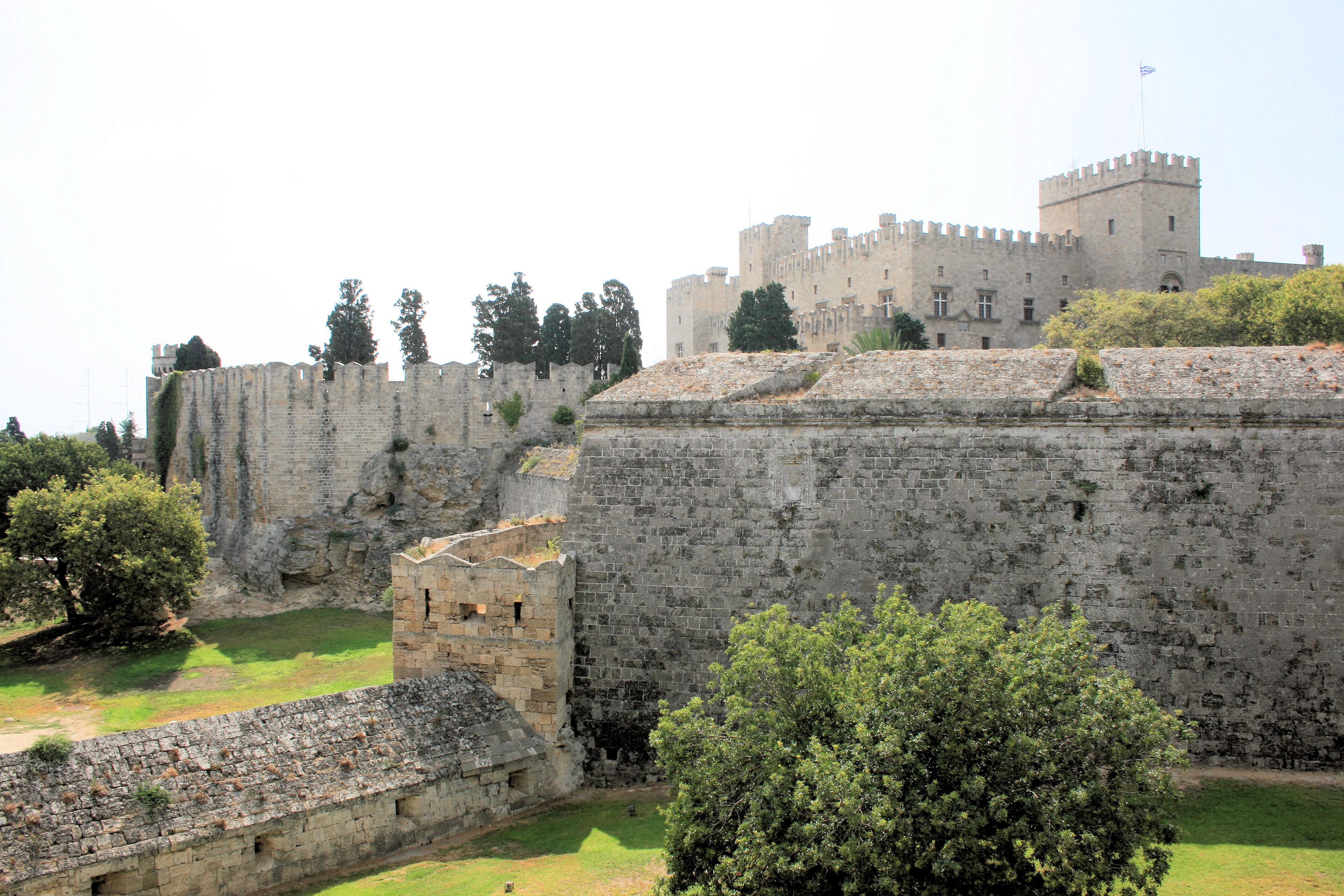 Grossmeisterpalast_Rhodos_2010